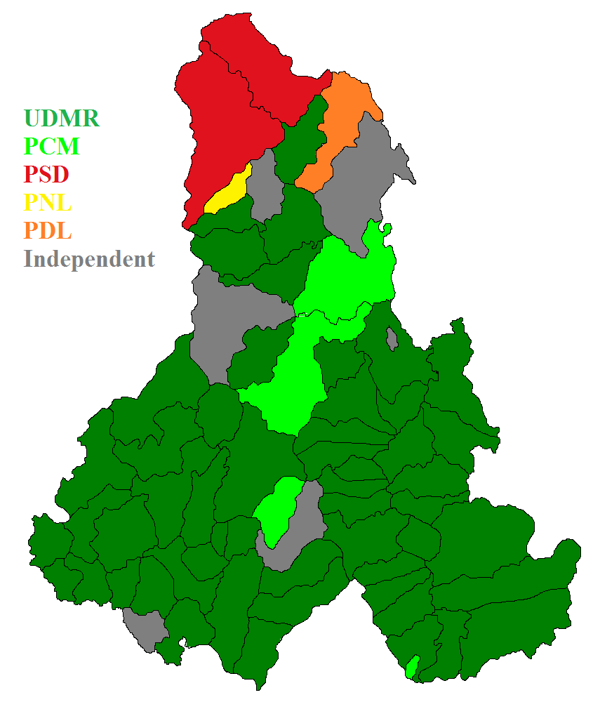 Harta politica a județului harghita .